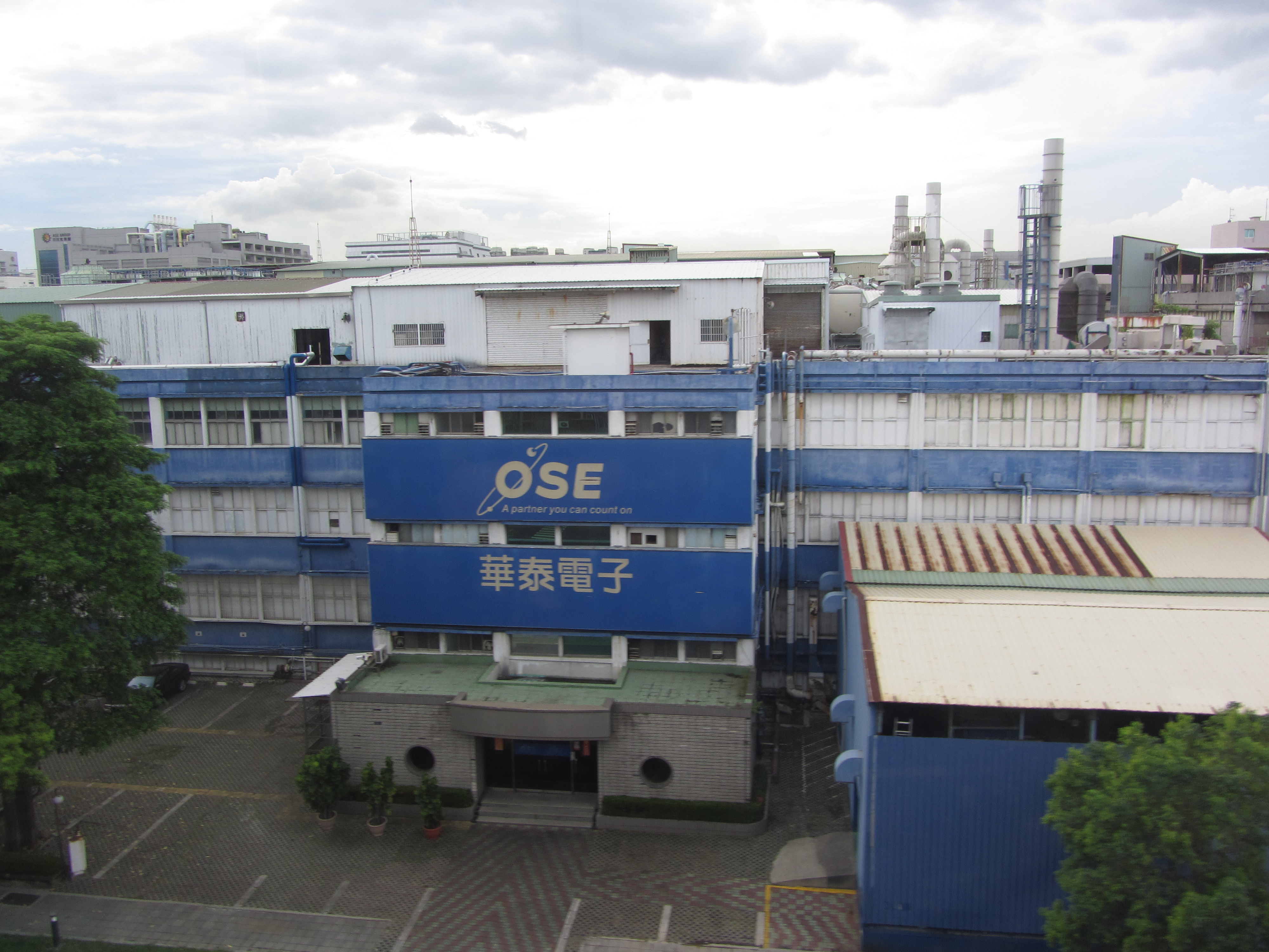 華泰電子在高雄市楠梓區的廠房。